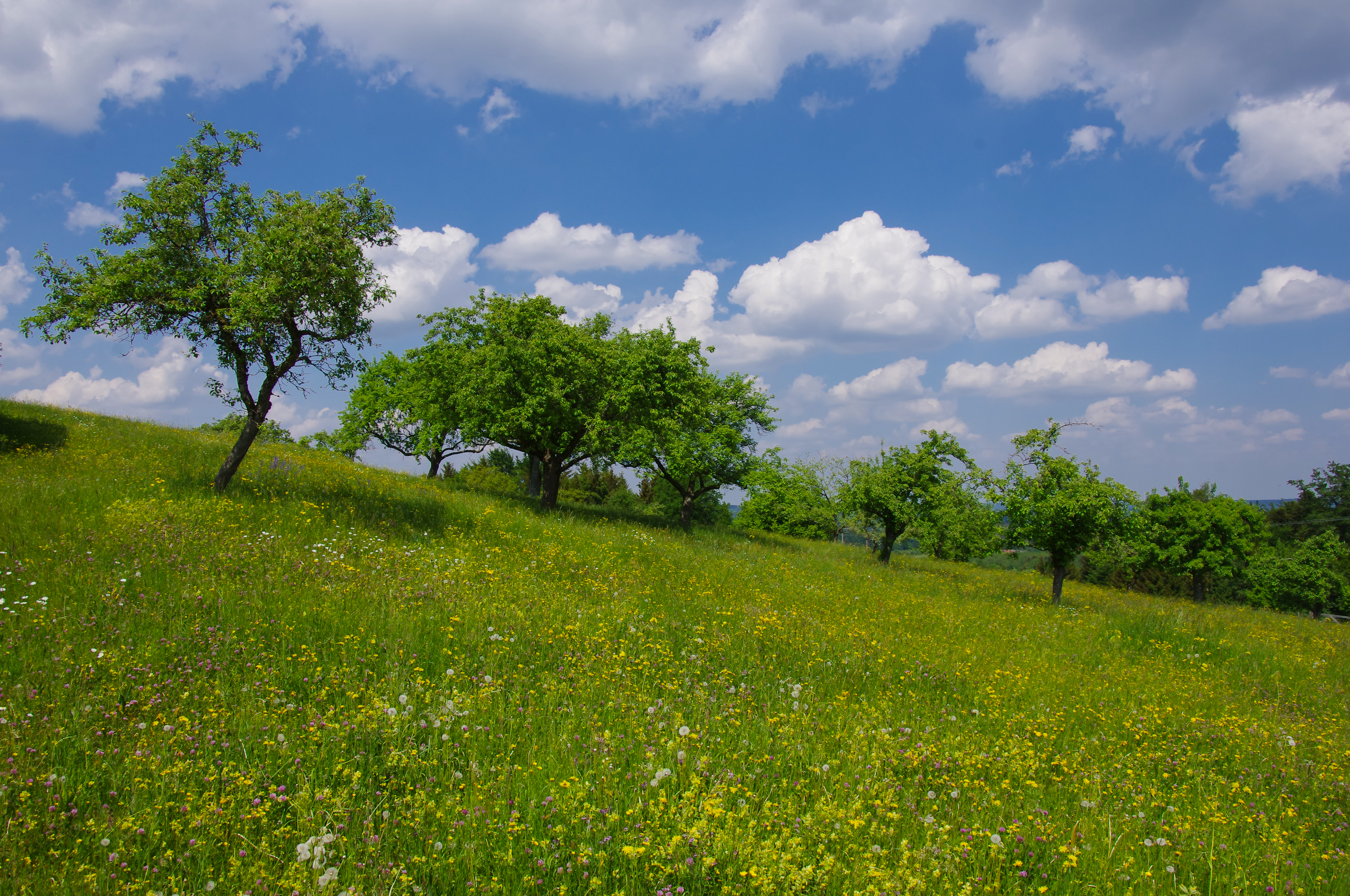 Streuobstwiese bei Altersberg (Gemeinde Gschwend, Ostalbkreis, Baden-Württemberg) im Naturpark Schwäbisch Fränkischer Wald